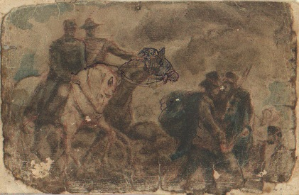 Lazar Drljaca, La ...... Romana, Ozieri, 1917, aquarelle 90 x 140 mm